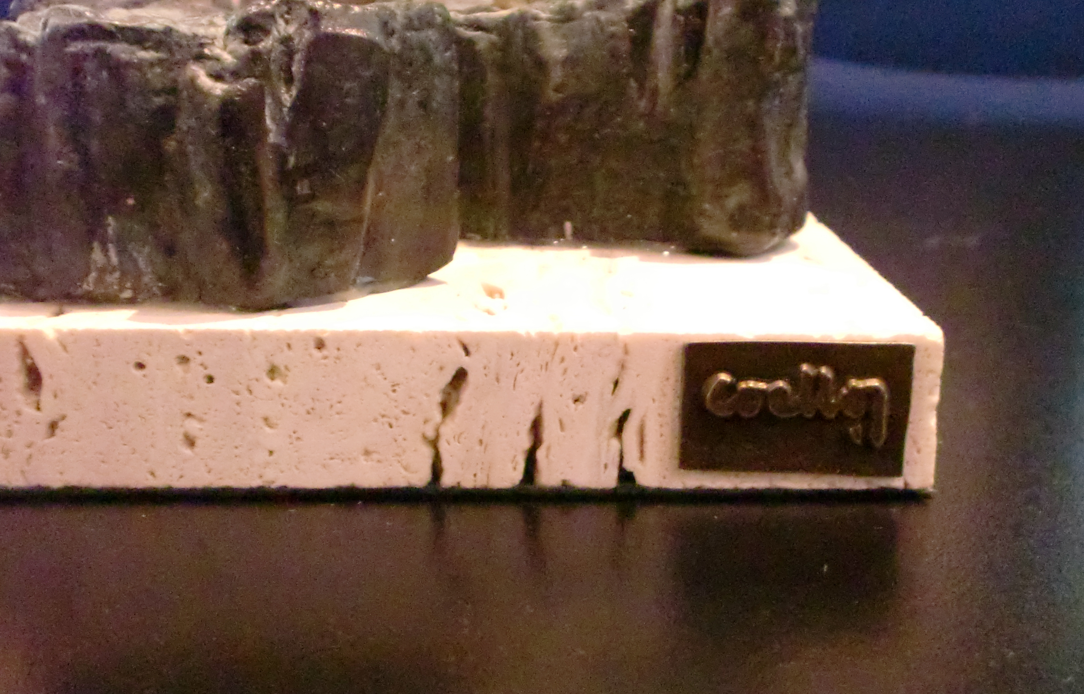 Firma del autor